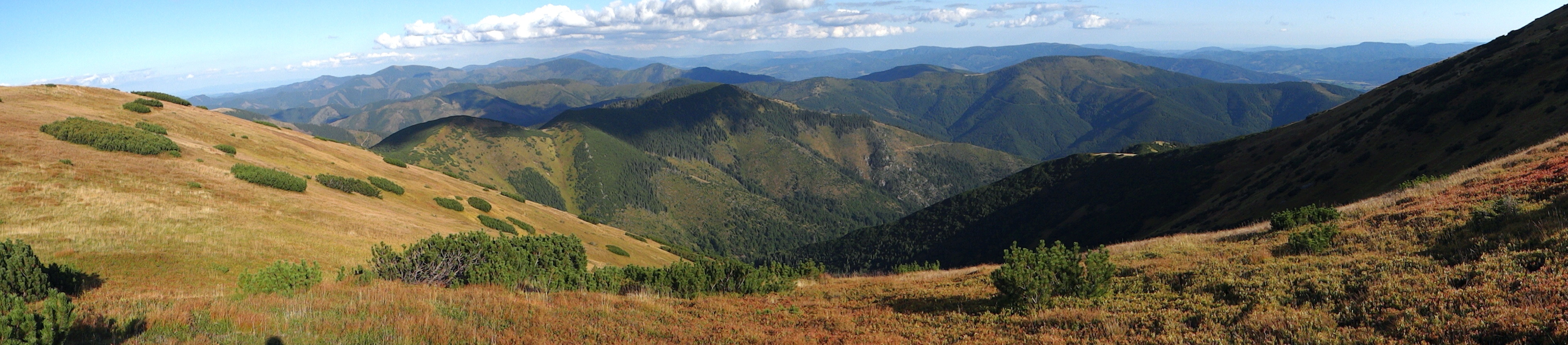 View from Králička